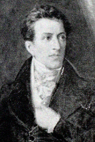 Fernando Errázuriz Aldunate (Santiago, 1 de junio de 1777 - ibídem, 16 de agosto de 1841) fue regidor, diputado, senador, miembro de la Junta de Gobierno, Director Supremo Delegado, Presidente provisorio y Vicepresidente de la República de Chile